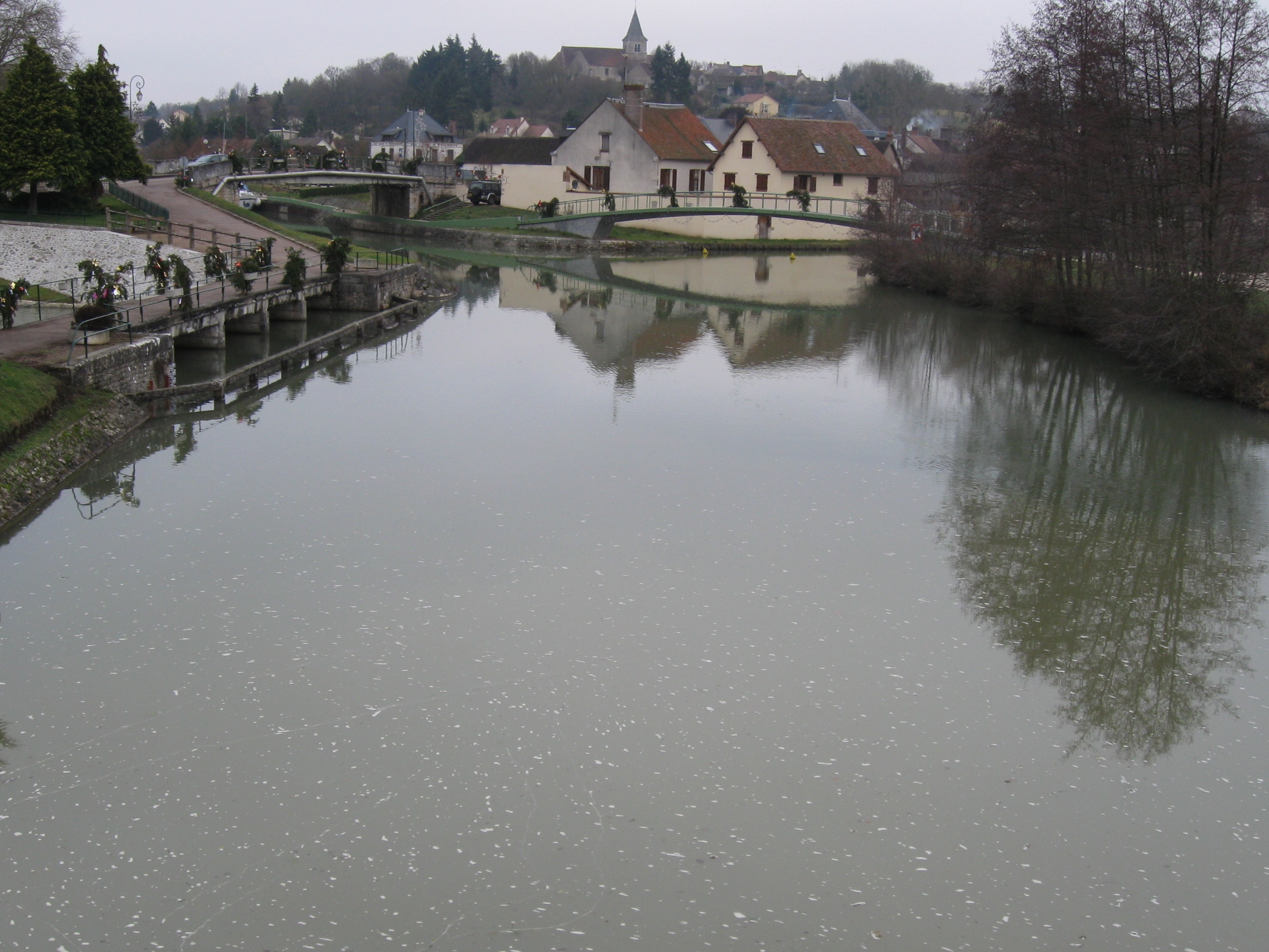 Rogny-les-Sept-Écluses. Croisement du Loing et du canal de Briare. À gauche, le Loing ; au centre-gauche, le canal de Briare ; à droite, le bras le plus nord des deux bras du Loing. Vue vers le nord.